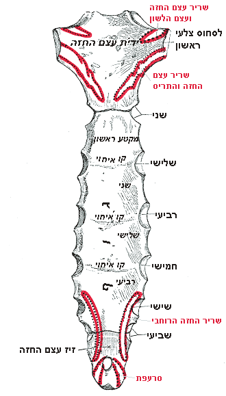 עצם החזה במבט אחורי